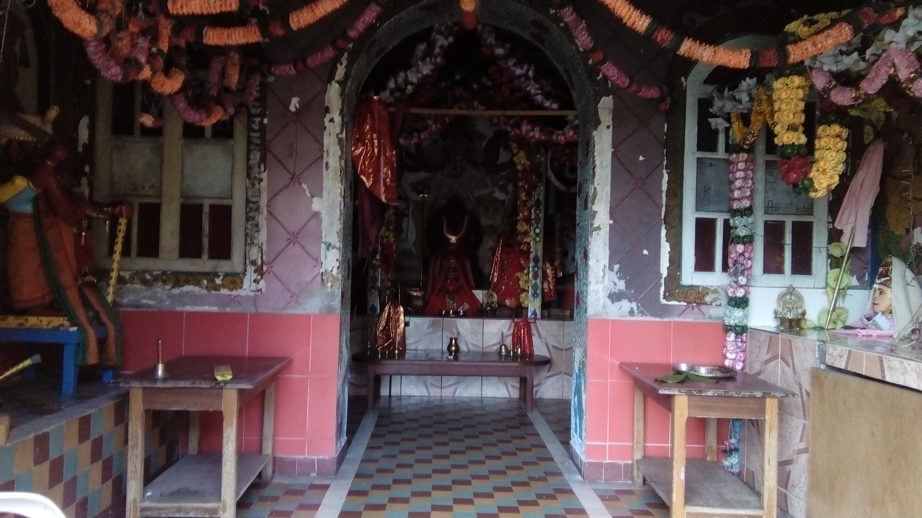 L'interieur du temple morange avec les différents divinités